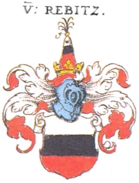 Wappen des fränkischen Adel- und Rittergeschlechts Redwitz.